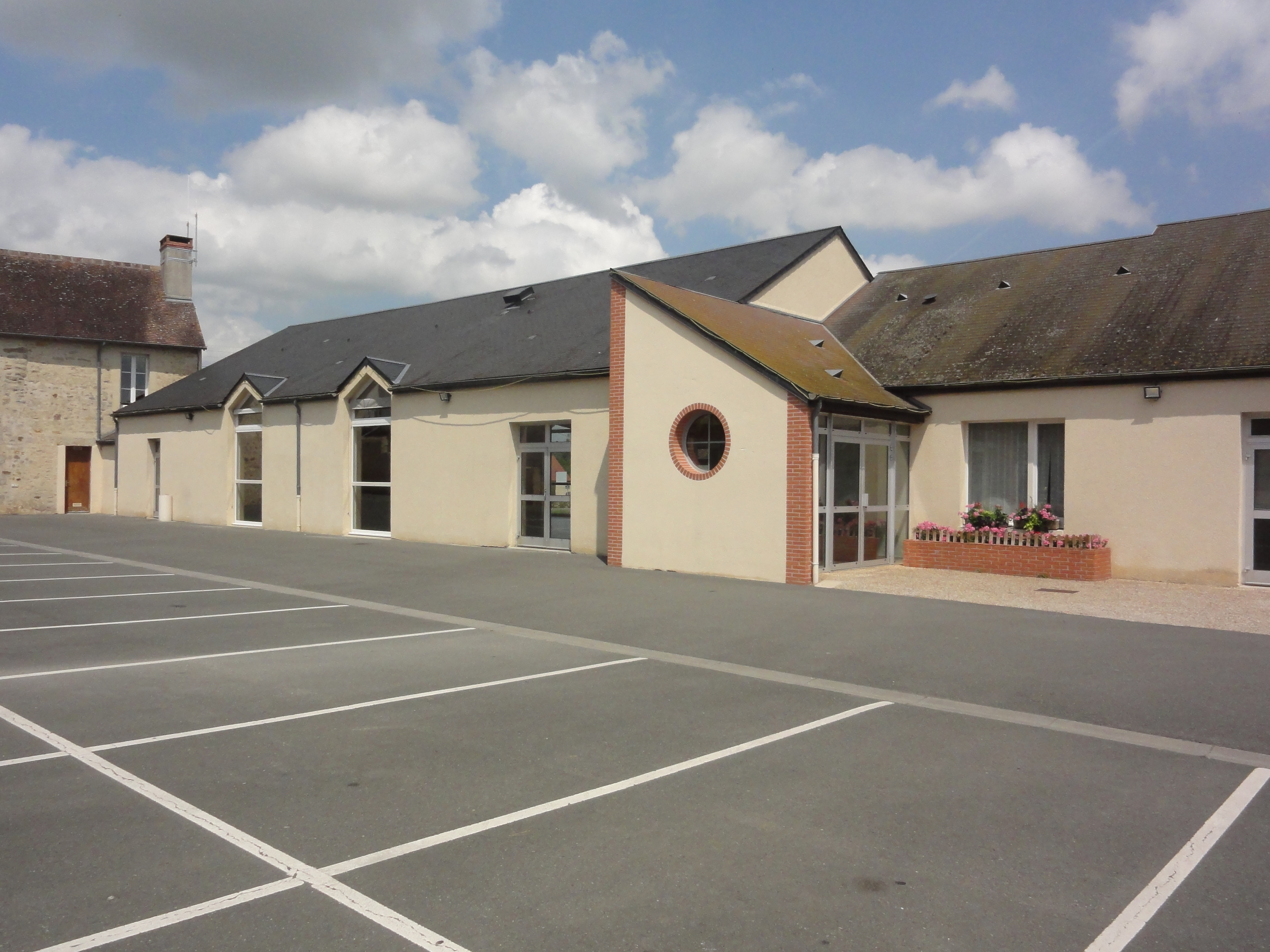 Fyé (Sarthe) salle polyvalente